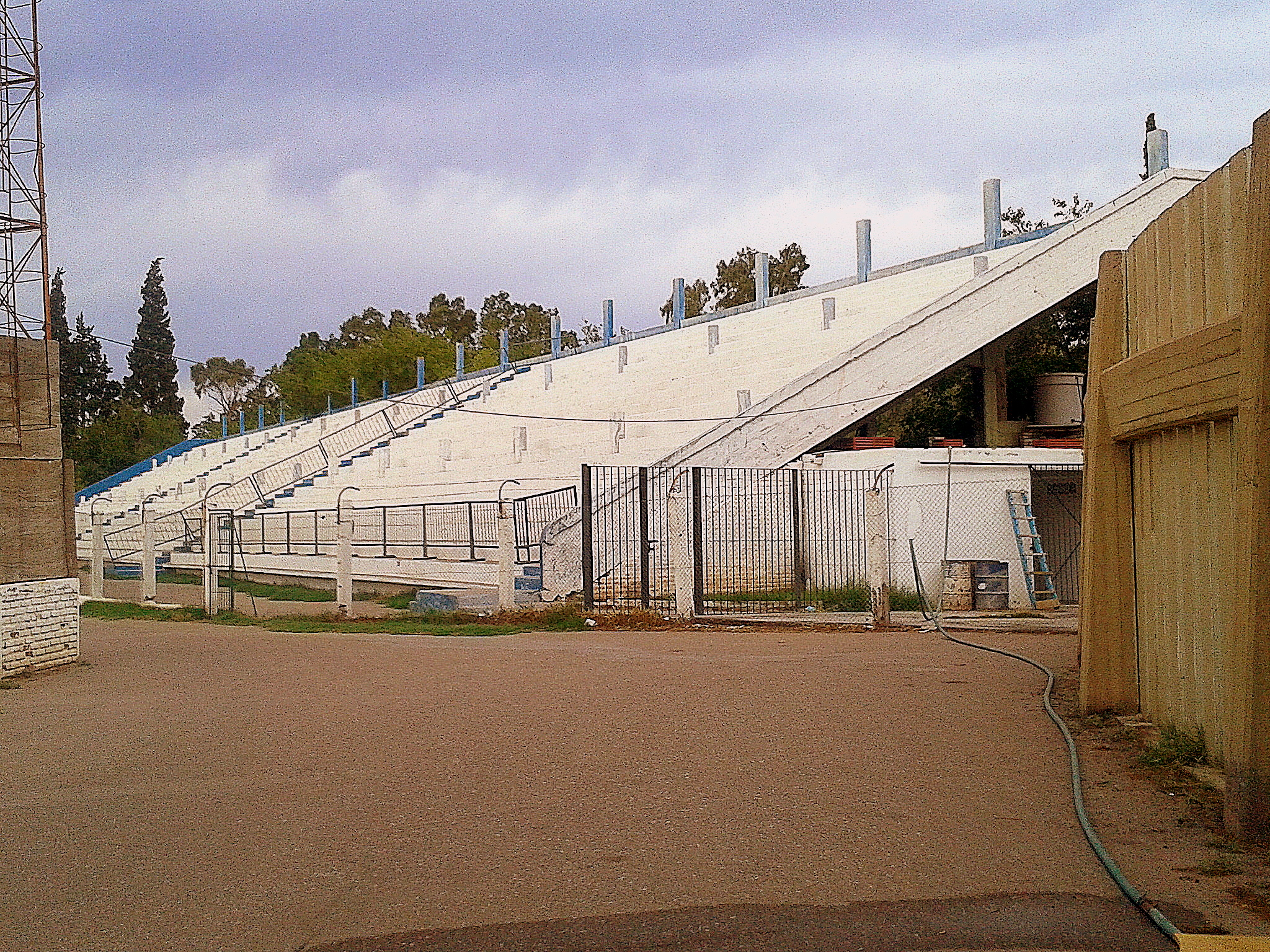 Tribuna del estadio que da la espalda al parque